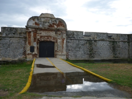 Castillo ubicado frente al Malecon de Puerto Cabello